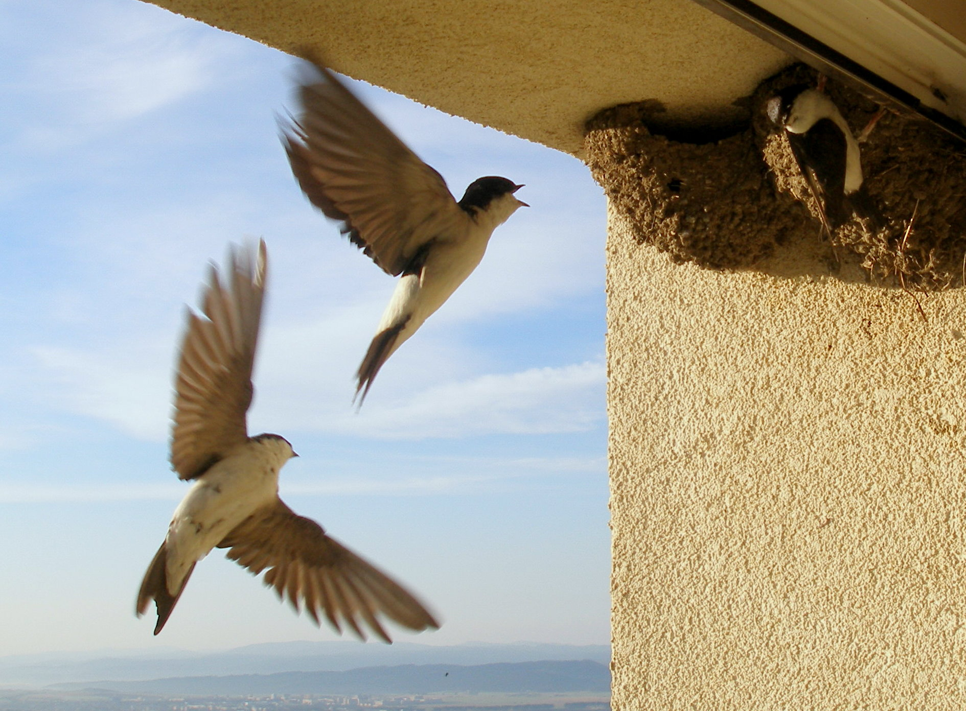 Lastovičky v Tatranských Zruboch